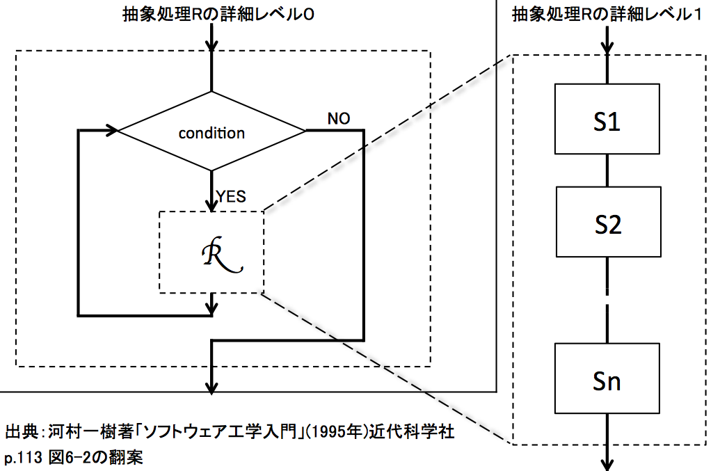 構造化プログラミングにおける抽象（abstraction）の説明資料画像。Excel for mac 2011で作成。 河村一樹著「ソフトウェア工学入門」（１９９５年）における著者独自のアイディアと思われる表記法の翻案であることを明記。